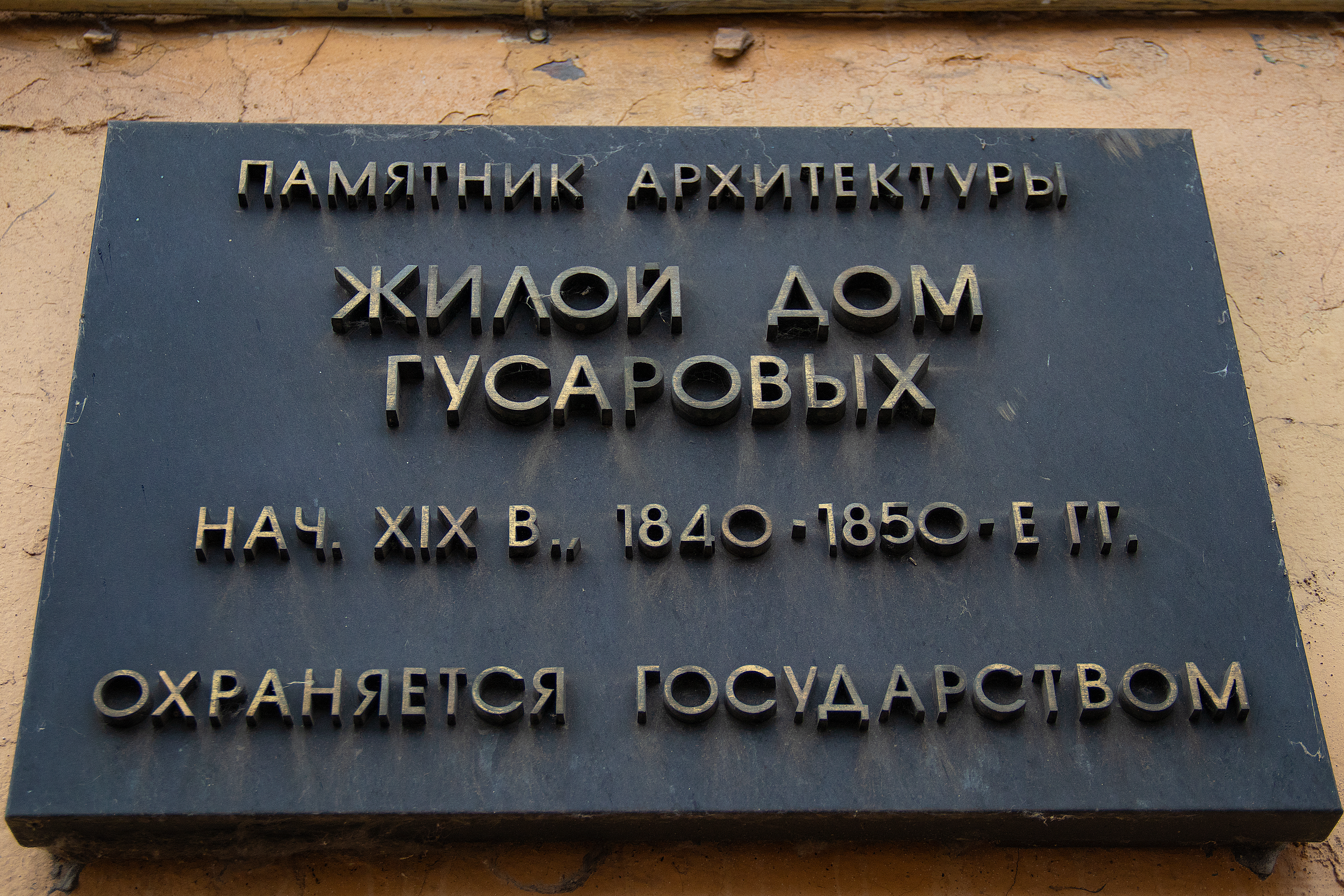 Табличка